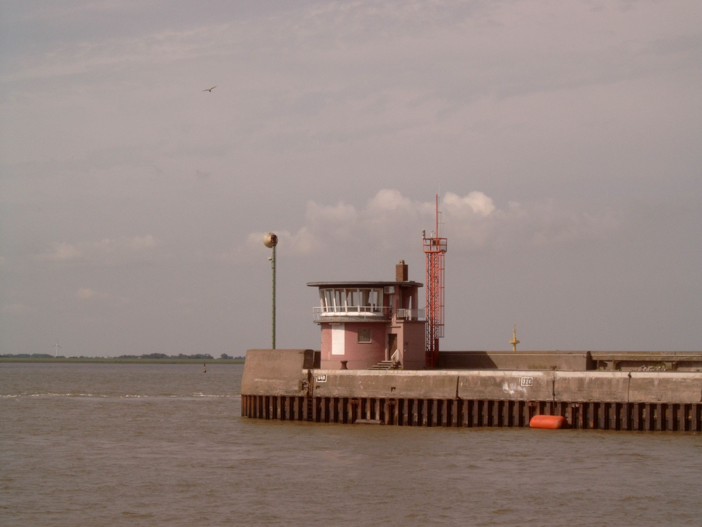 Signalturm des Bemer Schiffsmeldedienstes auf der Mole der Norschleuse in Bremerhaven